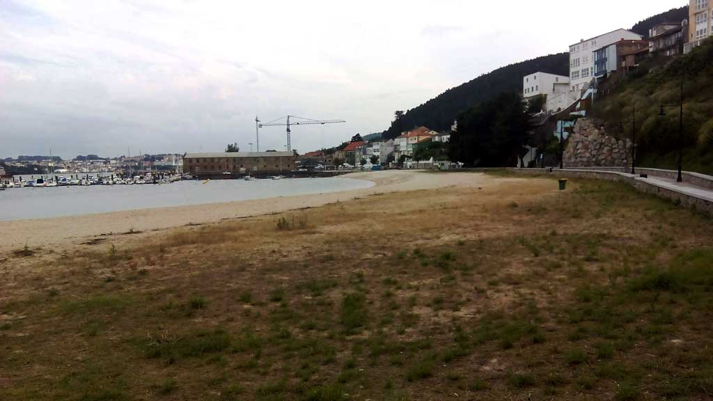 Praia da Graña, Ferrol.